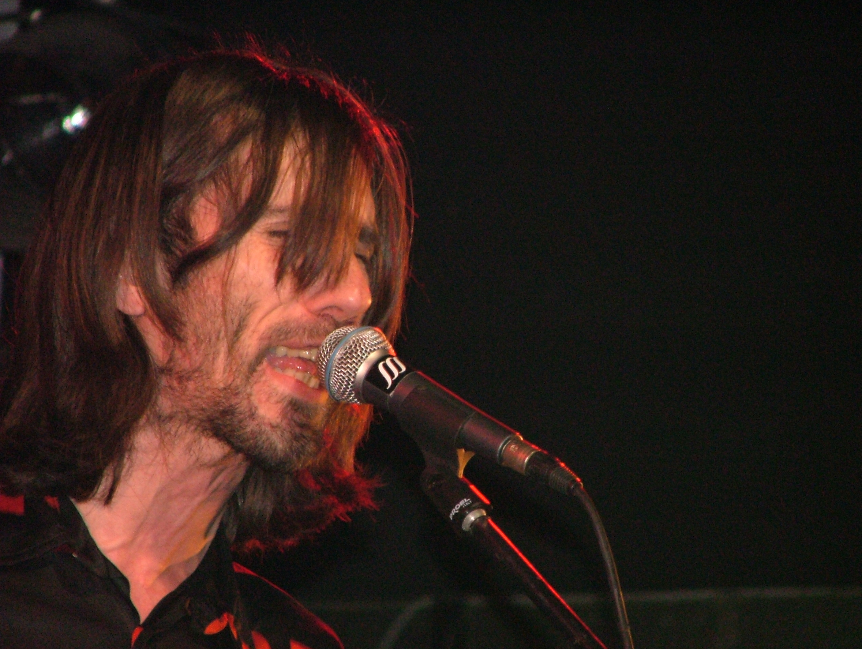 Marlene Kuntz@Hiroshima Mon Amour - 2006.02.02